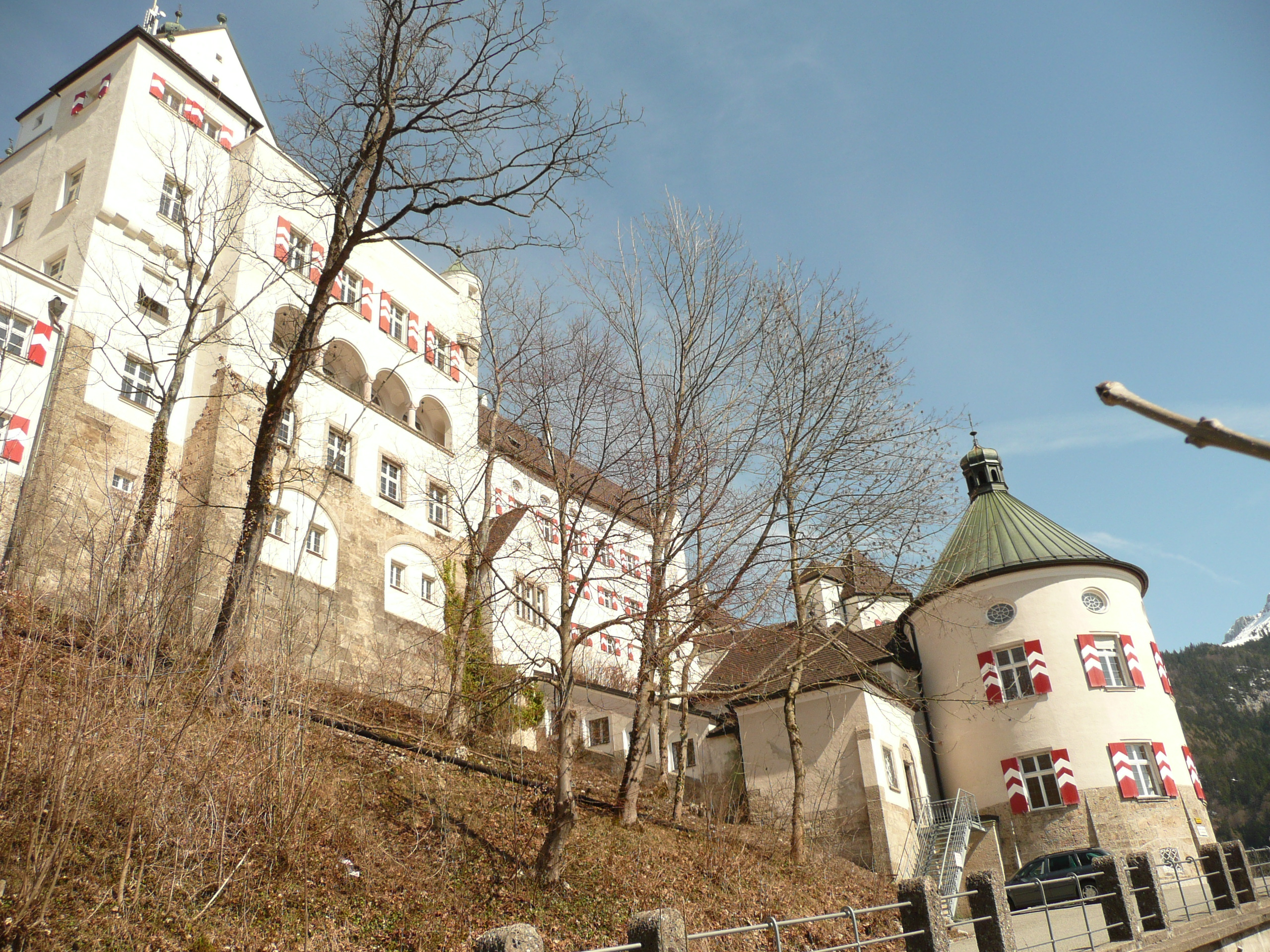 Die 1905-08 neu erbauten Gebäudeteile von der Einmündung des Fußweges auf die Zufahrt des Schlosses aus gesehen (Südwestansicht).